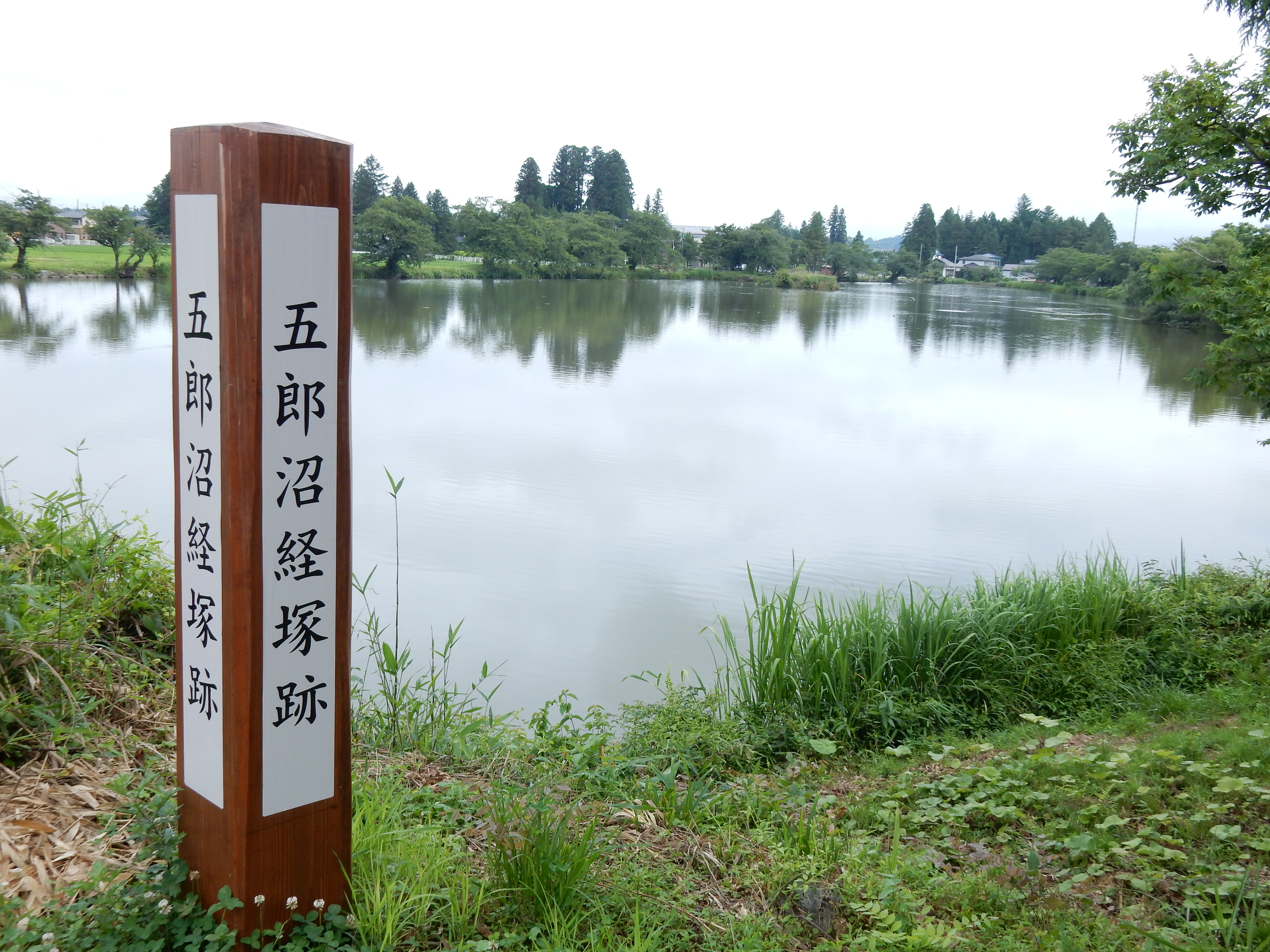 岩手県紫波町日詰 樋爪館跡にある五郎沼。樋爪五郎季衡がよく泳いでいたとの伝承がある。2016年7月21日撮影